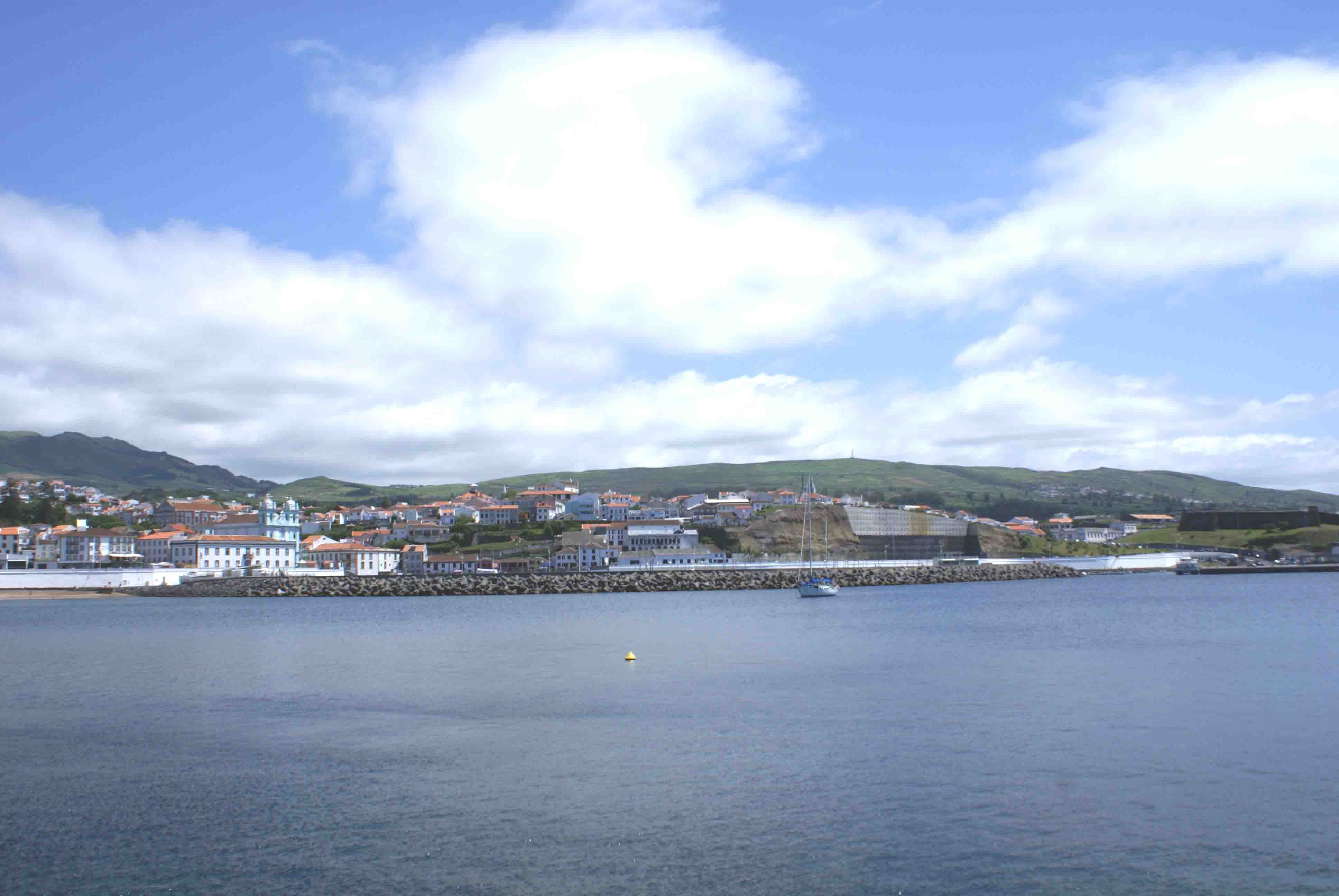 Vista geral da Baía de Angra do Heroísmo, ilha Terceira, Açores, Portugal.